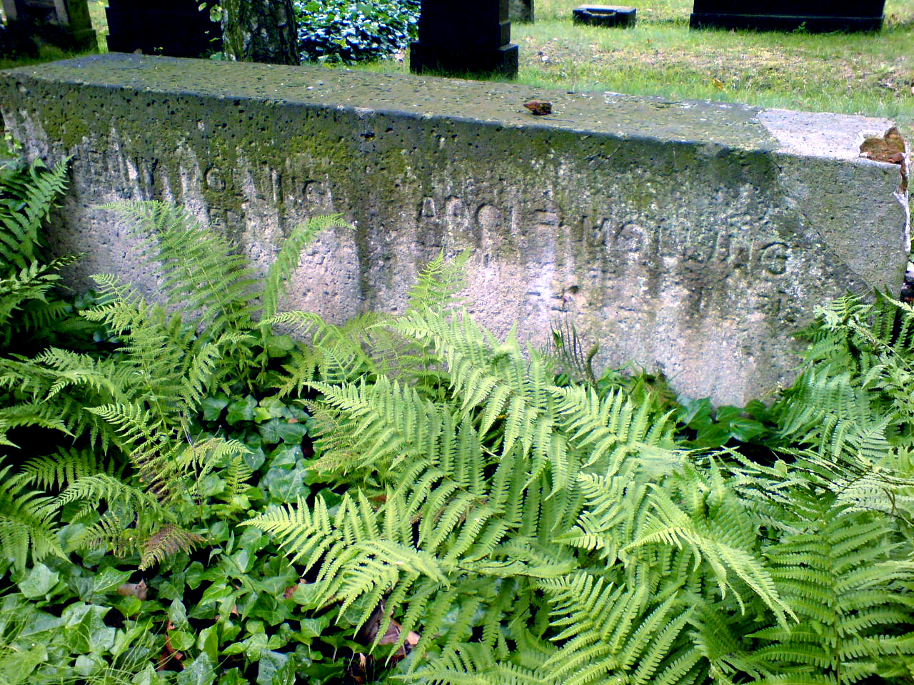 Grabmal von Adolf und Henny Molling auf dem Jüdischen Friedhof an der Strangriede in Hannover